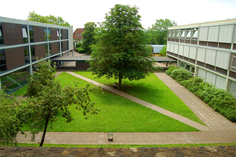 Der Innenhof des Gymnasium Andreanum Hildesheim